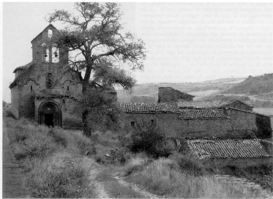 Katalain